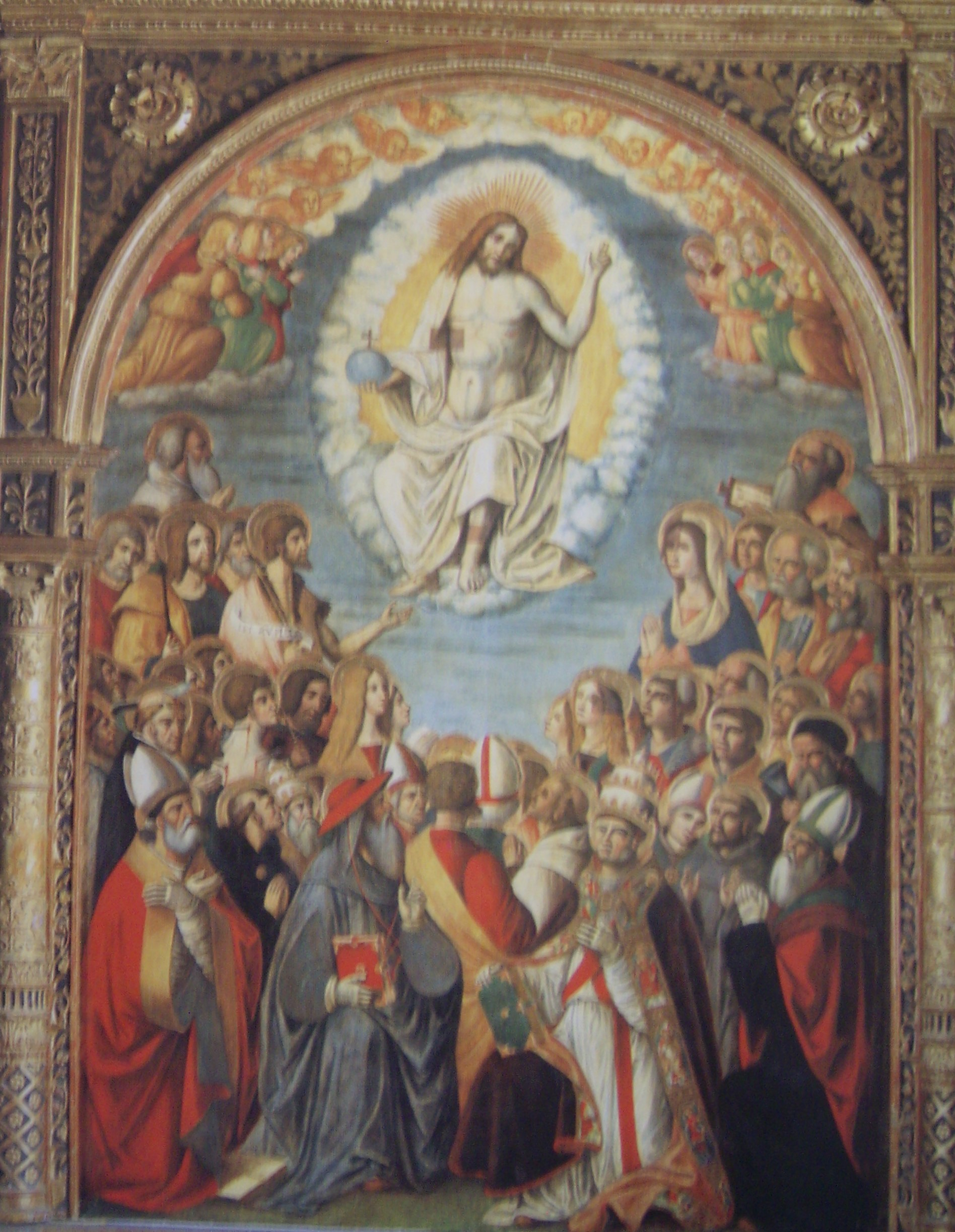 Pala Ognissanti opera di Antonio Marinoni per la chiesa di San Giacomo e Vincenzo a Gromo